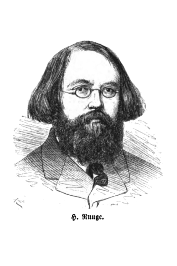 Brustporträt von Heinrich Runge (1817–1886), 1867 in der Illustrirten Welt veröffentlicht